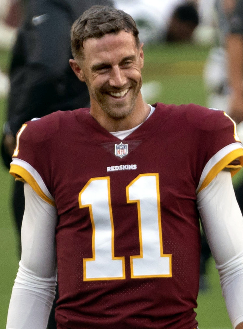 Jets at Redskins 8/16/18